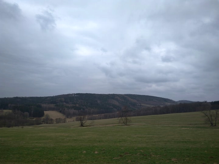 Gerstenberg v německé části Šluknovské pahorkatiny